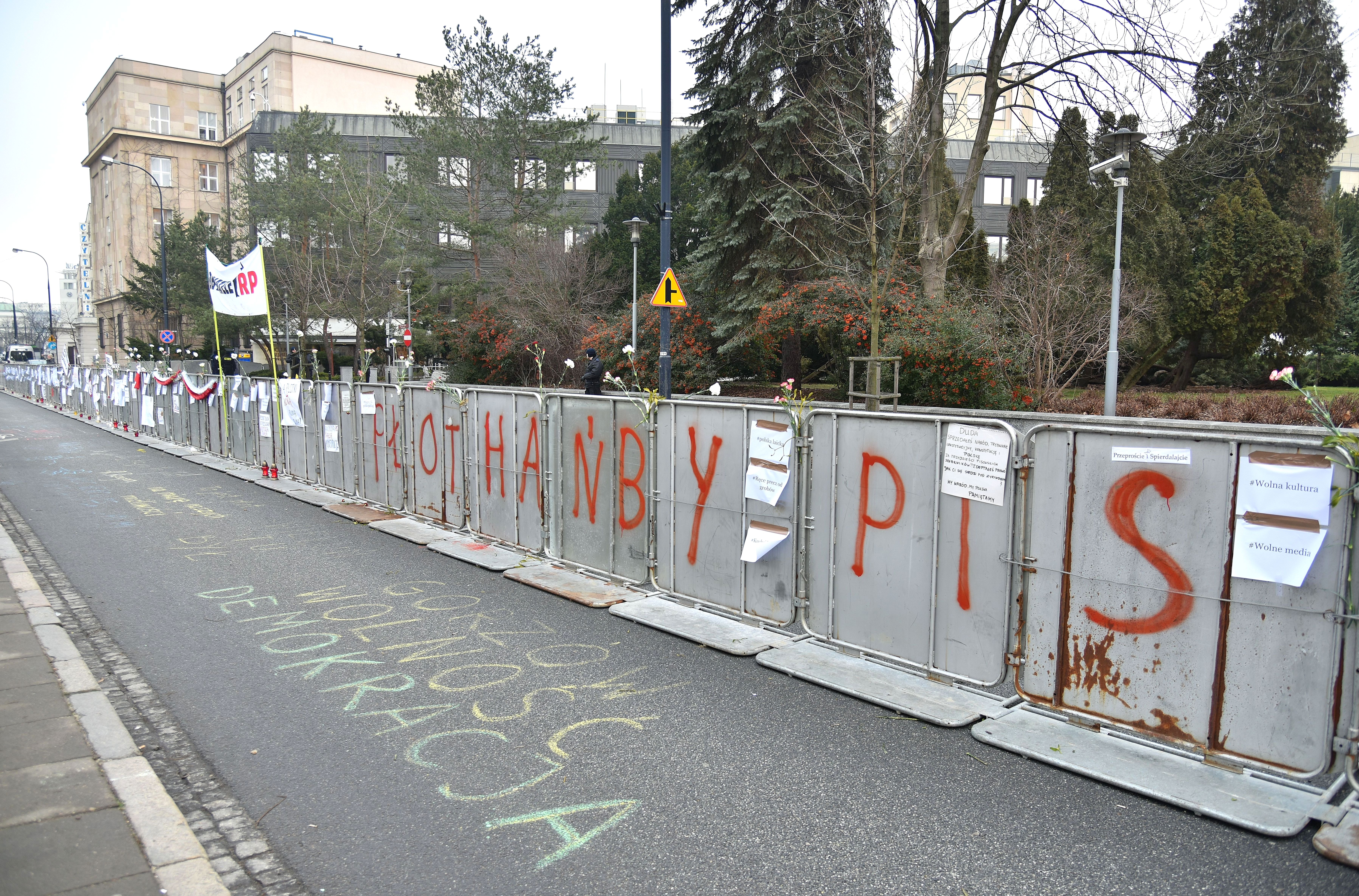 Płot ustawiony na środku ulicy Wiejskiej podczas kryzysu sejmowego.